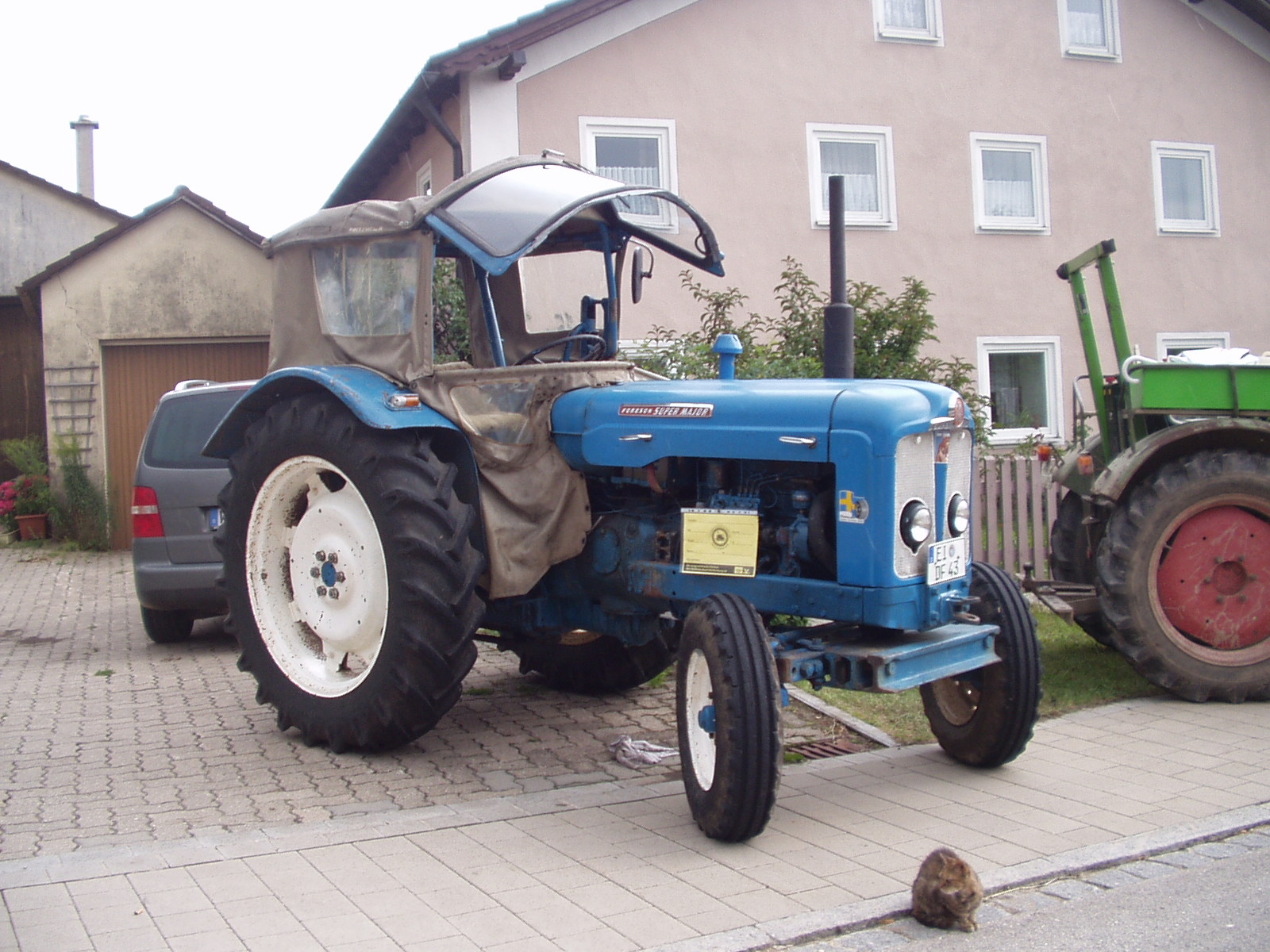 Fordson-Traktor Super Major beim Oldtimertreffen Göhren, Pappenheim, Landkreis Weißenburg-Gunzenhausen, Bayern, (2005 oder) 2006